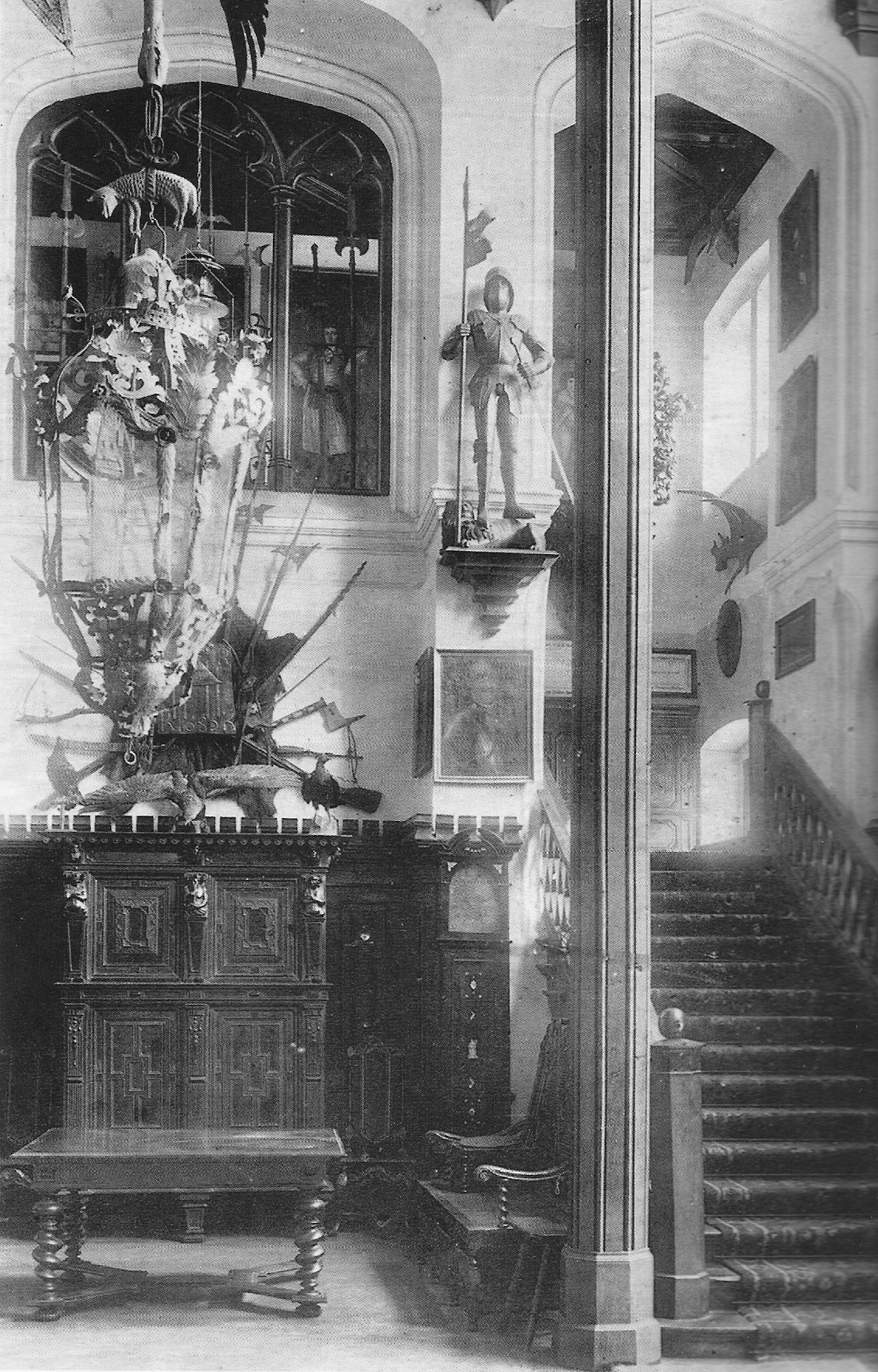 Hol w pałacu Radolińskich w Jarocinie, rok 1908.